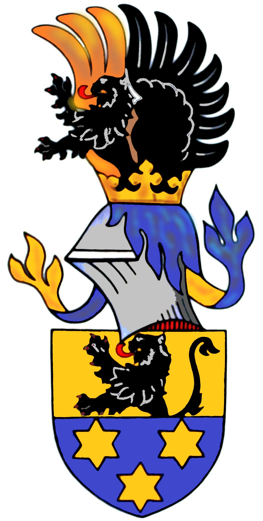 Erb rodu Ilburků